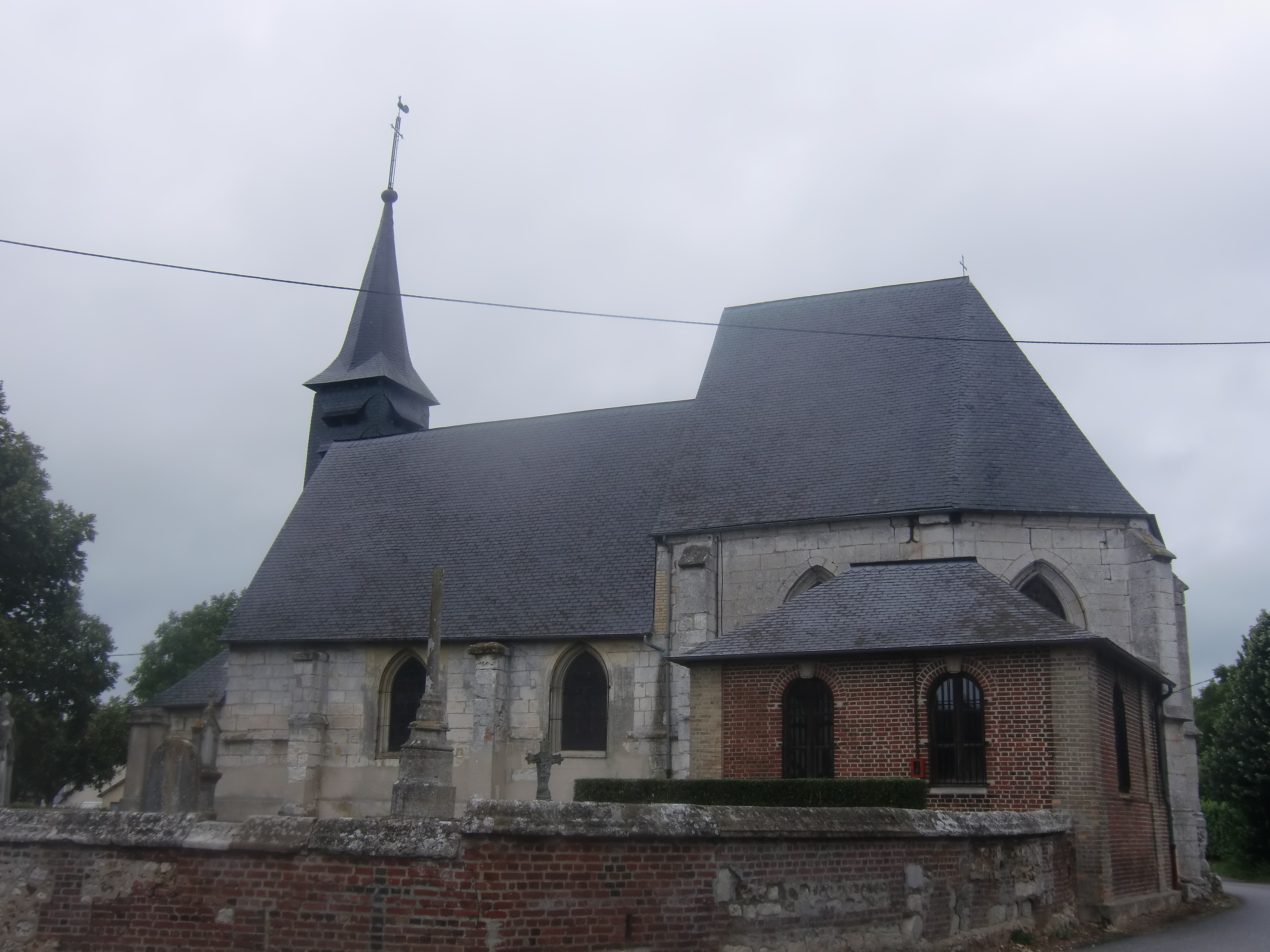 Eglise de Saint-Ouen-du-Tilleul (Eure, Normandie, France)